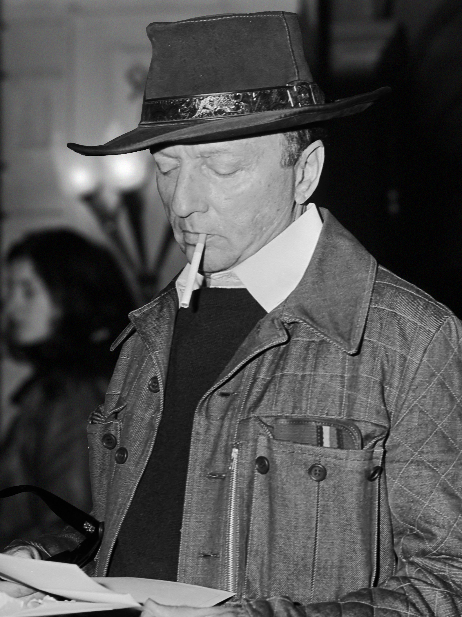 Harold Robbins 5 november 1979